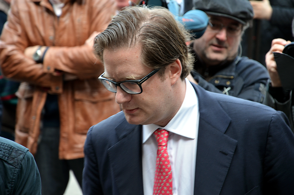 Ein Eindruck vom Tag des Freispruches für Bundeskanzler a.D. Christian Wulff und David Groenewold vor dem Landgericht Hannover ...